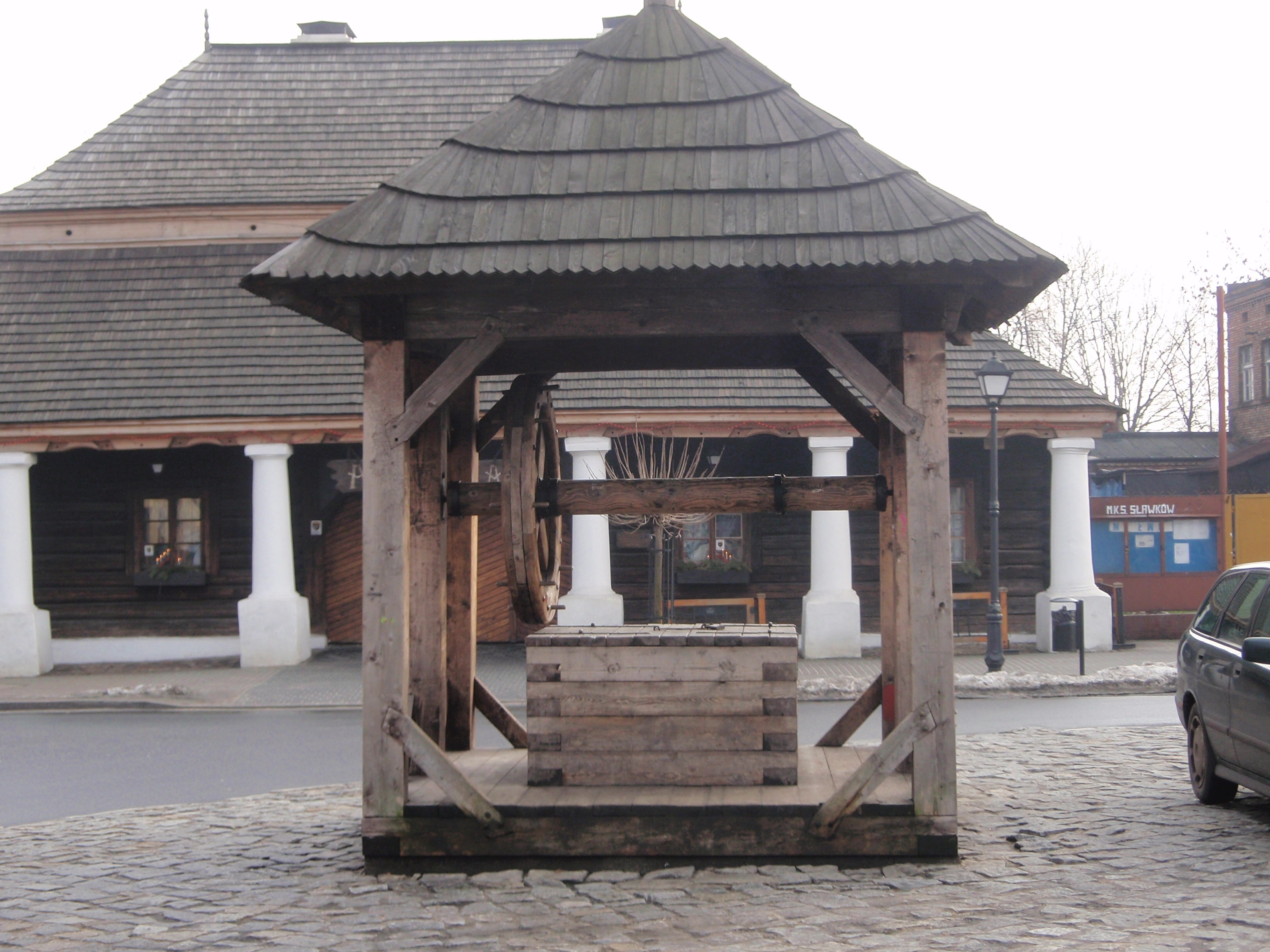 Studnia i karczma na Rynku w Sławkowie (woj. śląskie)